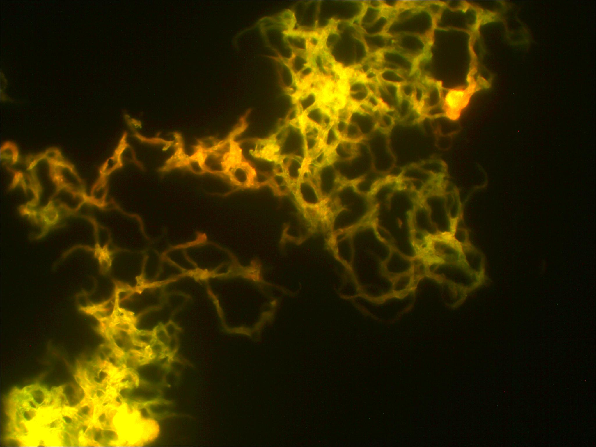 Люминисцентная микроскопия мазка колонии m.tuberculosis выращеной методом Bactec MGIT-960. Демонстрируется корд-фактор.